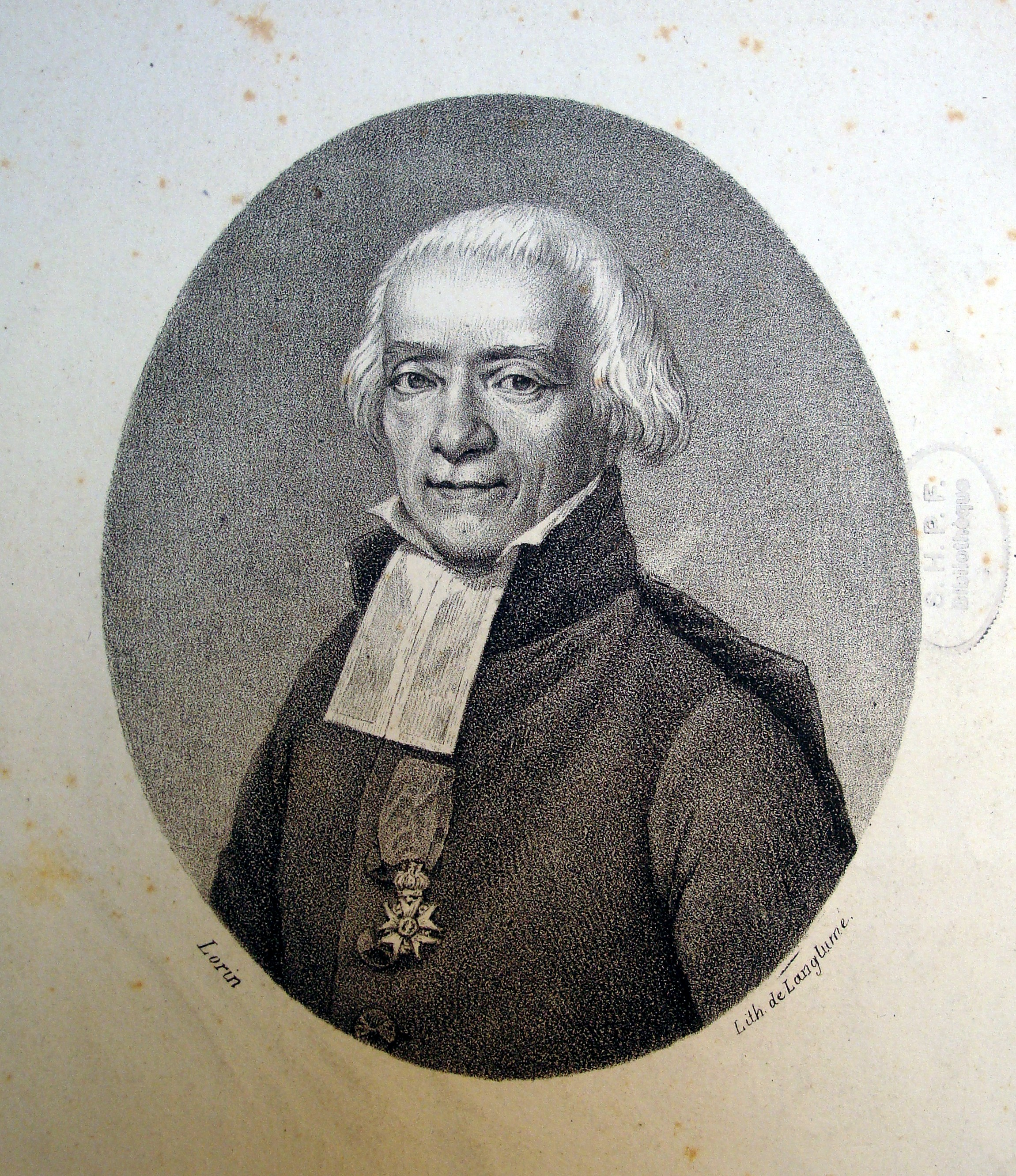 Jacques Antoine Rabaut-Pommier (Source : BPF,Cote : PR 22)